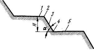 Схема